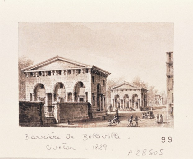 La barrière de Belleville au début du XIXe siècle, par Christophe Civeton